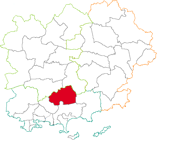 Situation du canton dans le département du Var